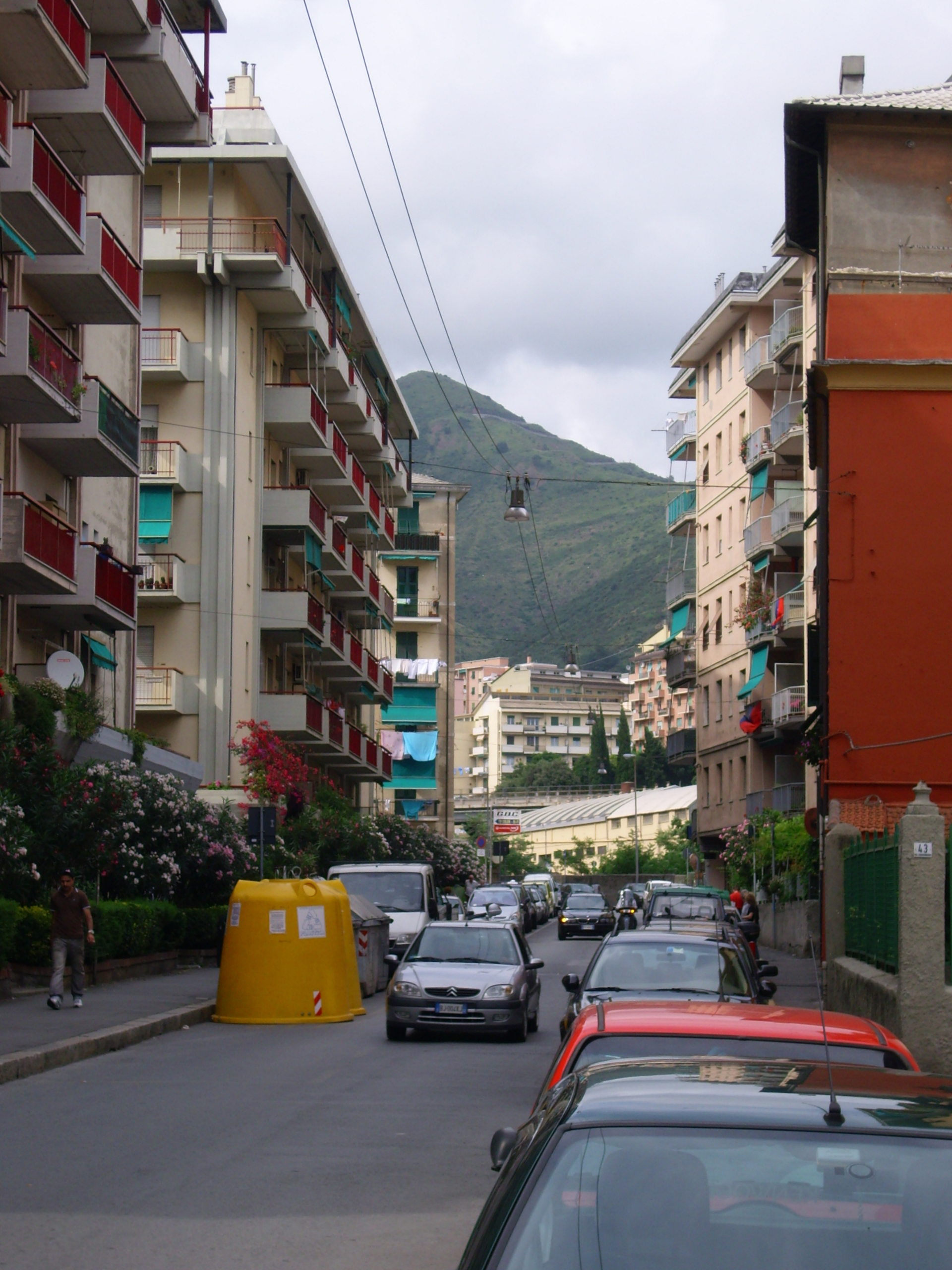 Via Chiaravagna, Sestri P., Genova